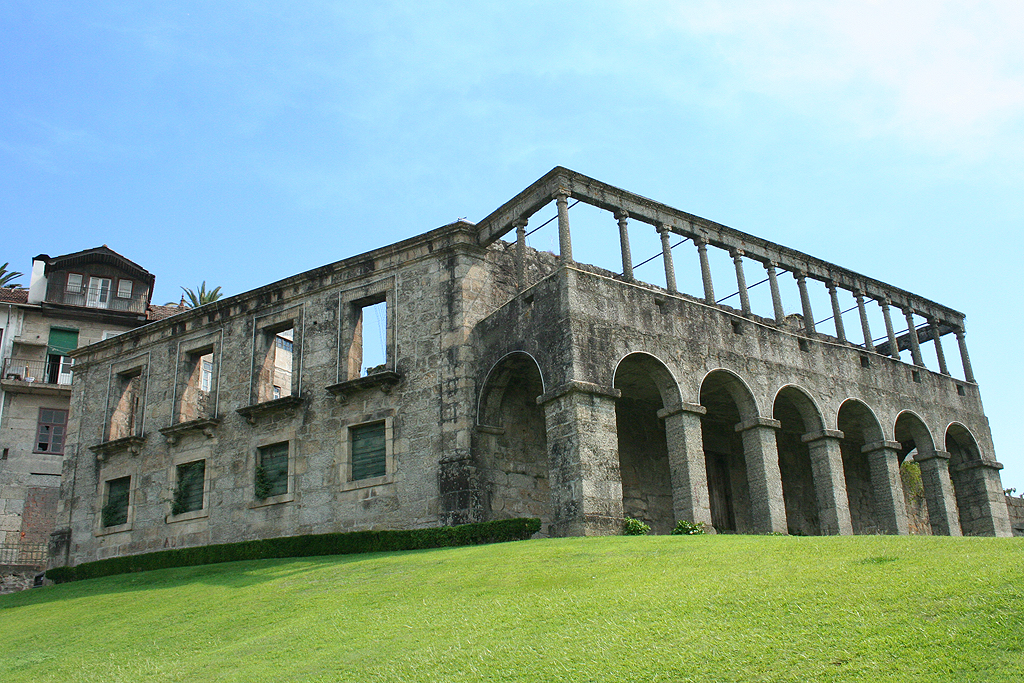 Edifício do Século XVIII, que pertencia à familia Magalhães em Amarante. Encontra-se em ruína desde 1809, quando foi incendiado pelas tropas francesas durante as 2ªs invasões francesas.